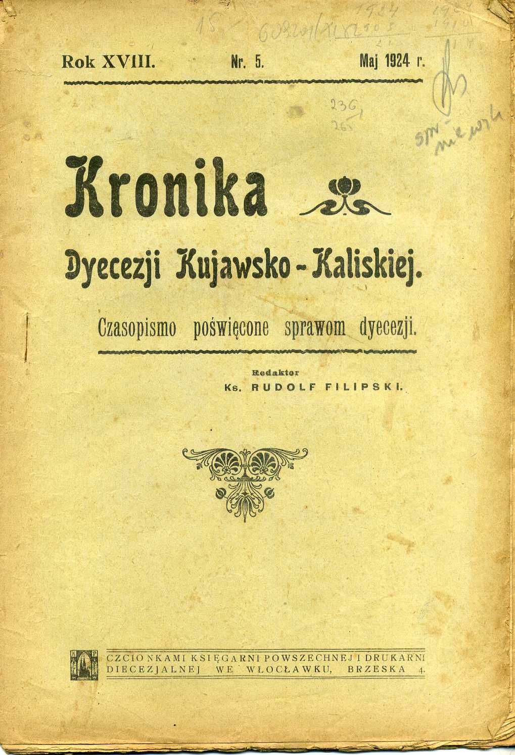 Okładka Kroniki Diecezji Kujawsko-Kaliskiej z maja 1924 roku